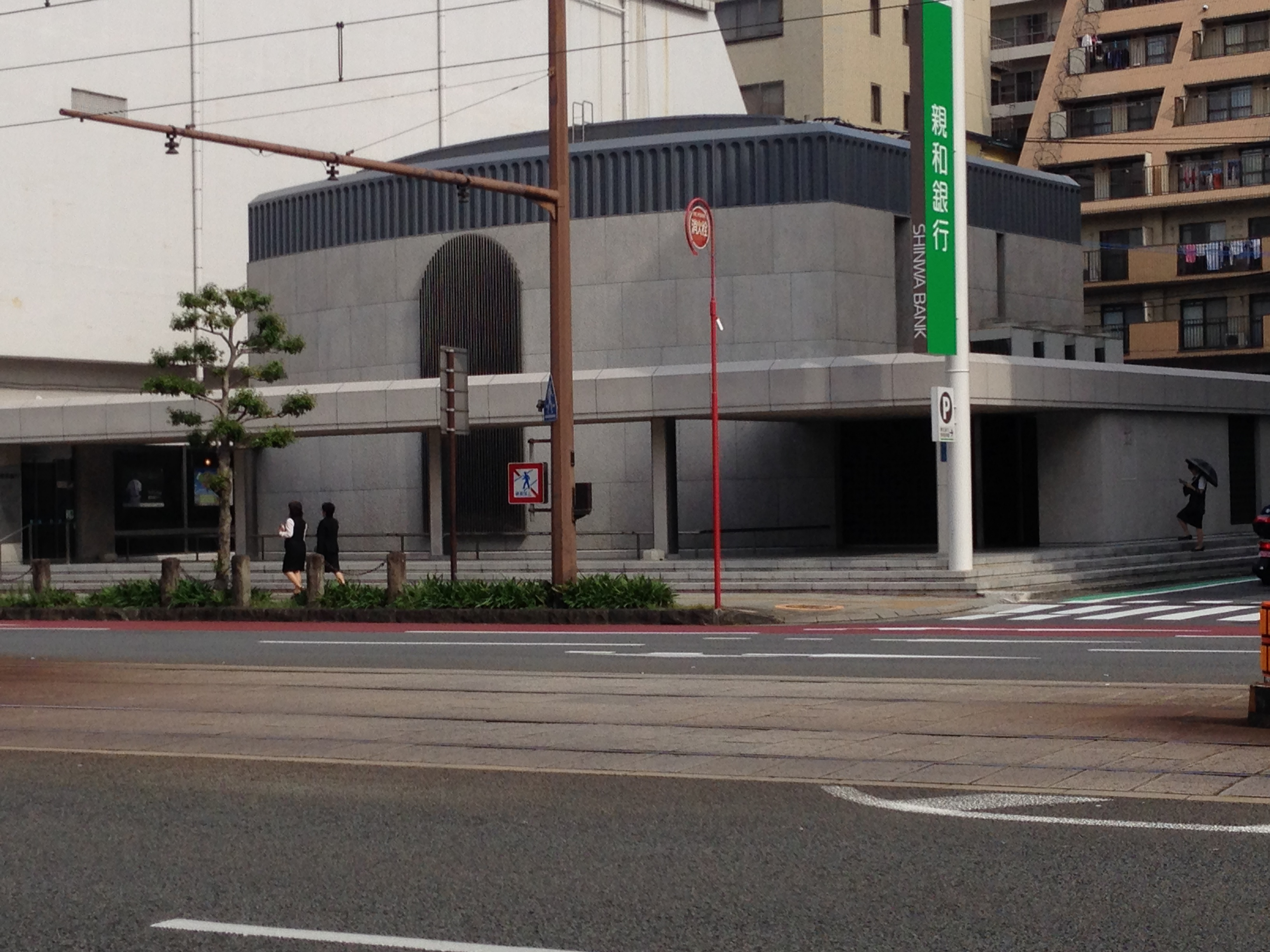 親和銀行 大波止支店外観